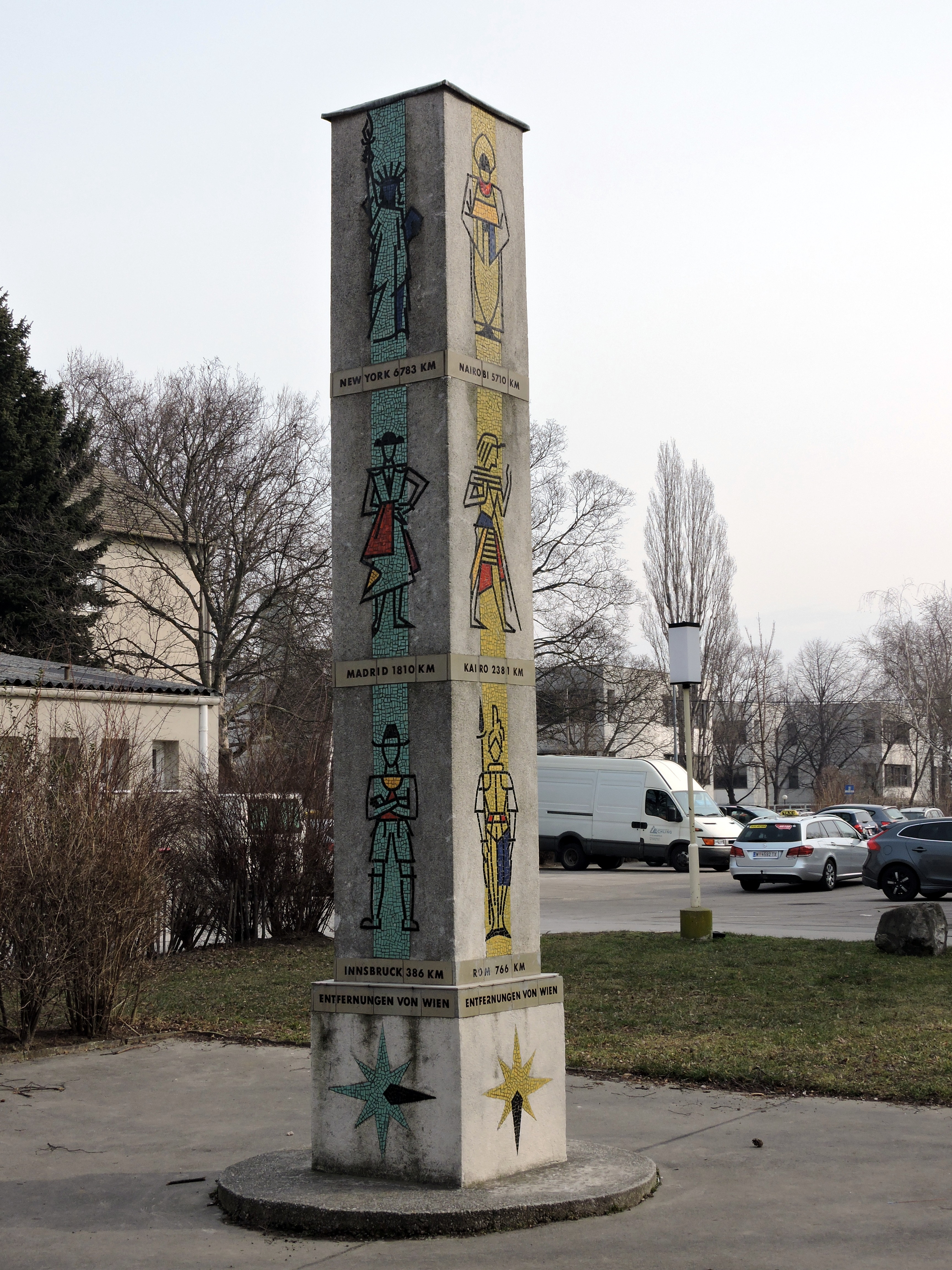 Bildliche Darstellungen der Weltrichtungen